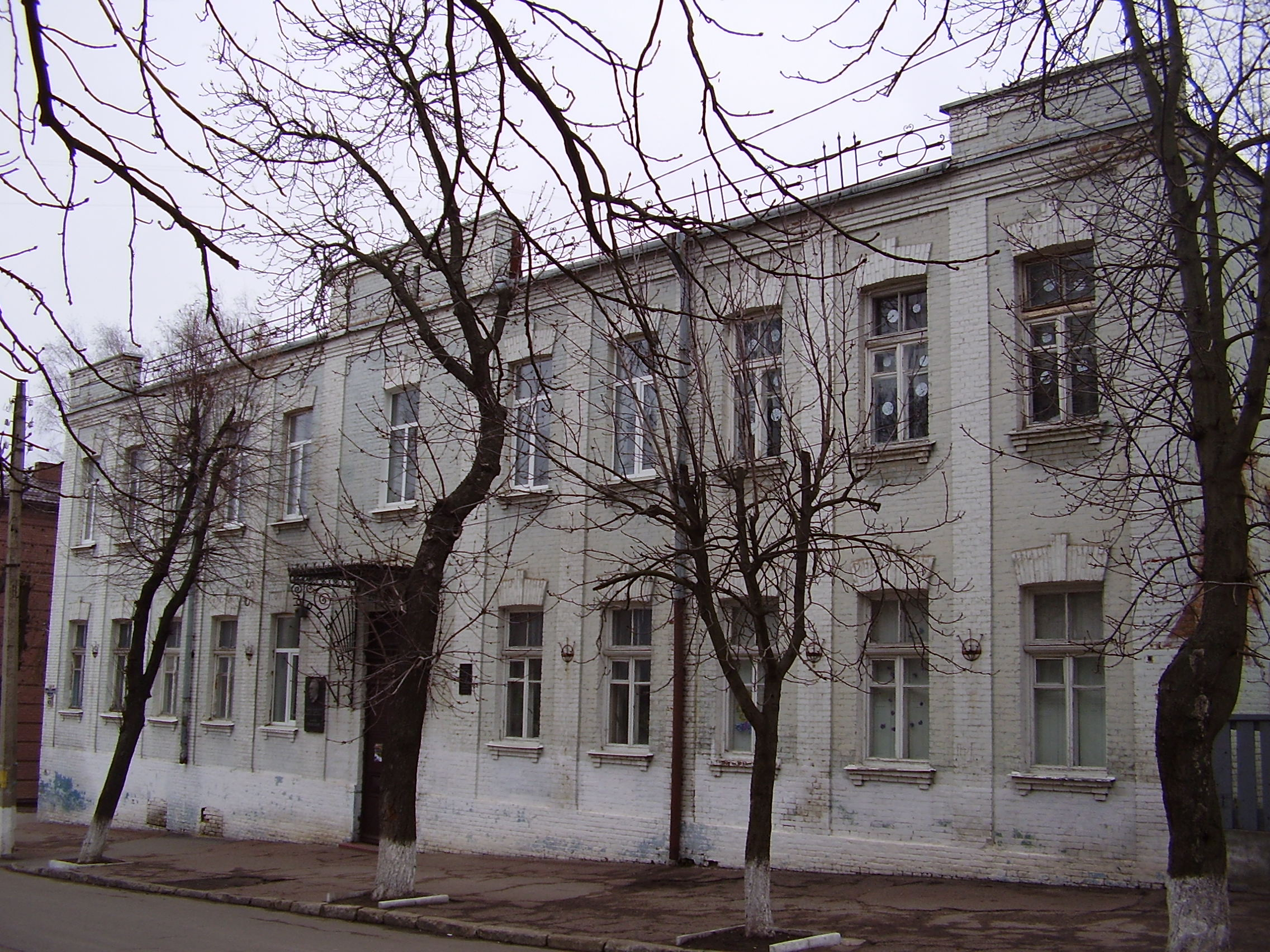 Чоловіча приватна гімназія, Кіровоград, вул. А. Тарковського, 36